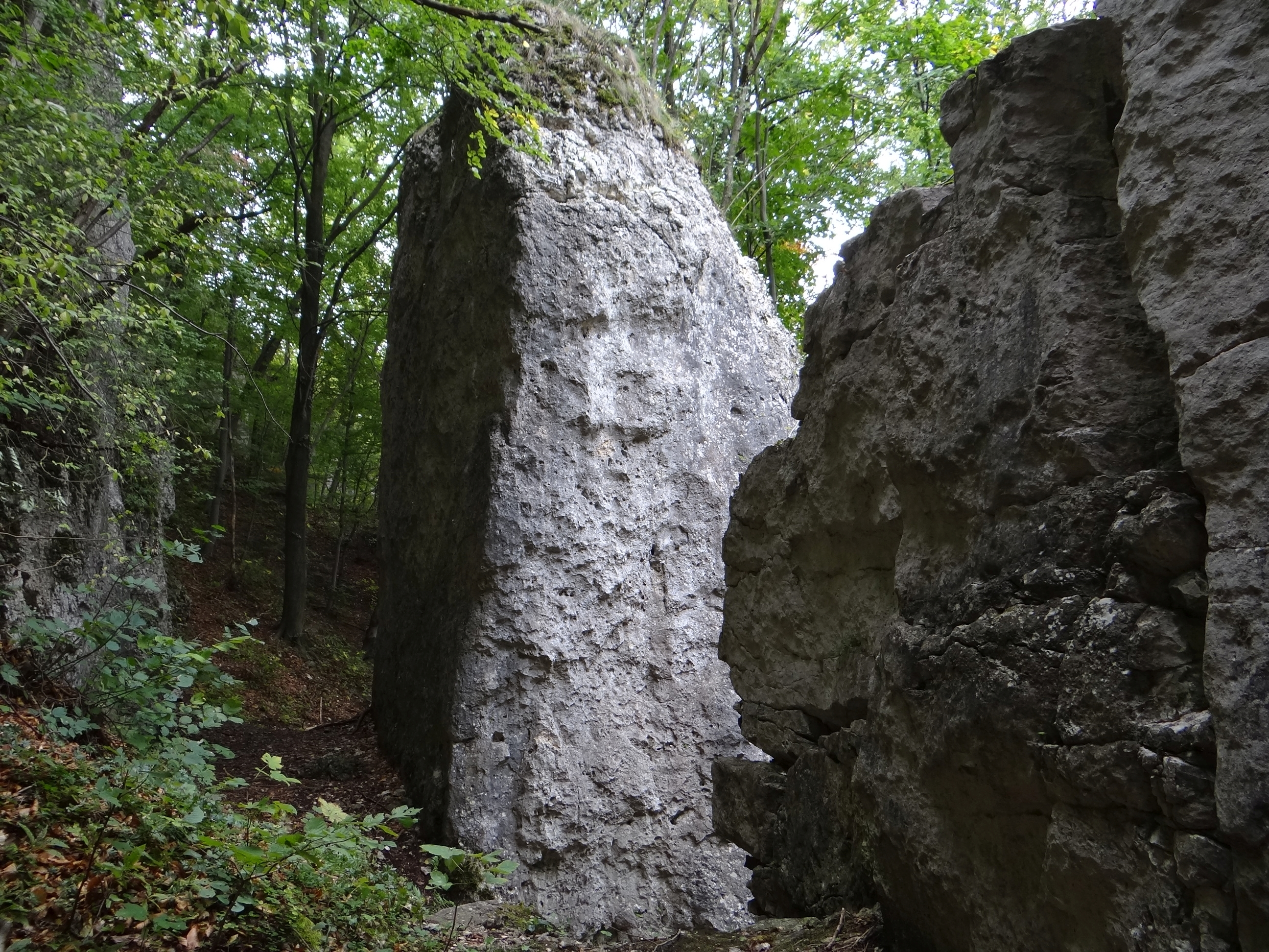 Czarci Korytarz w Dolinie Będkowskiej